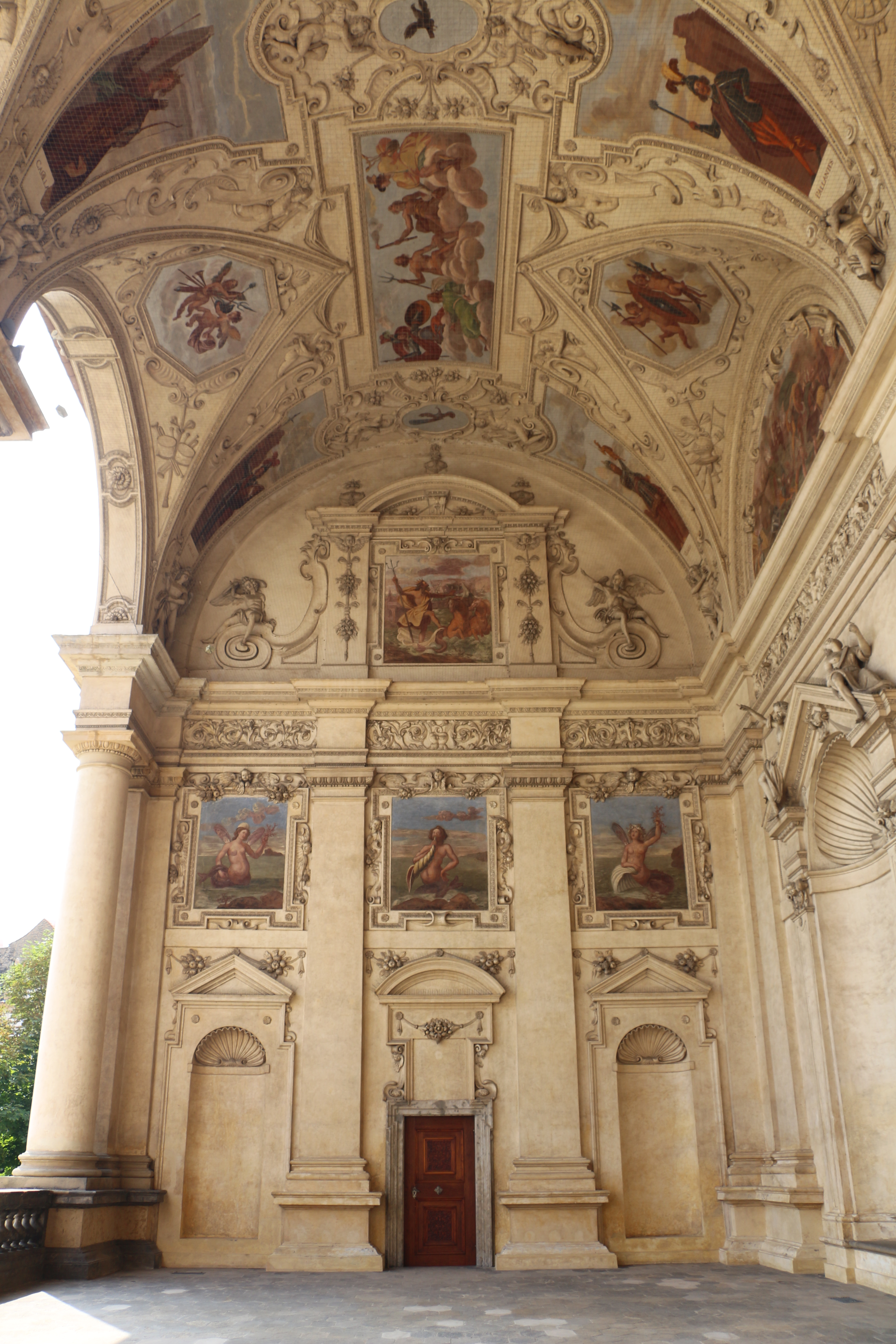 Loggia im Garten des Wallensteinpalais in Prag